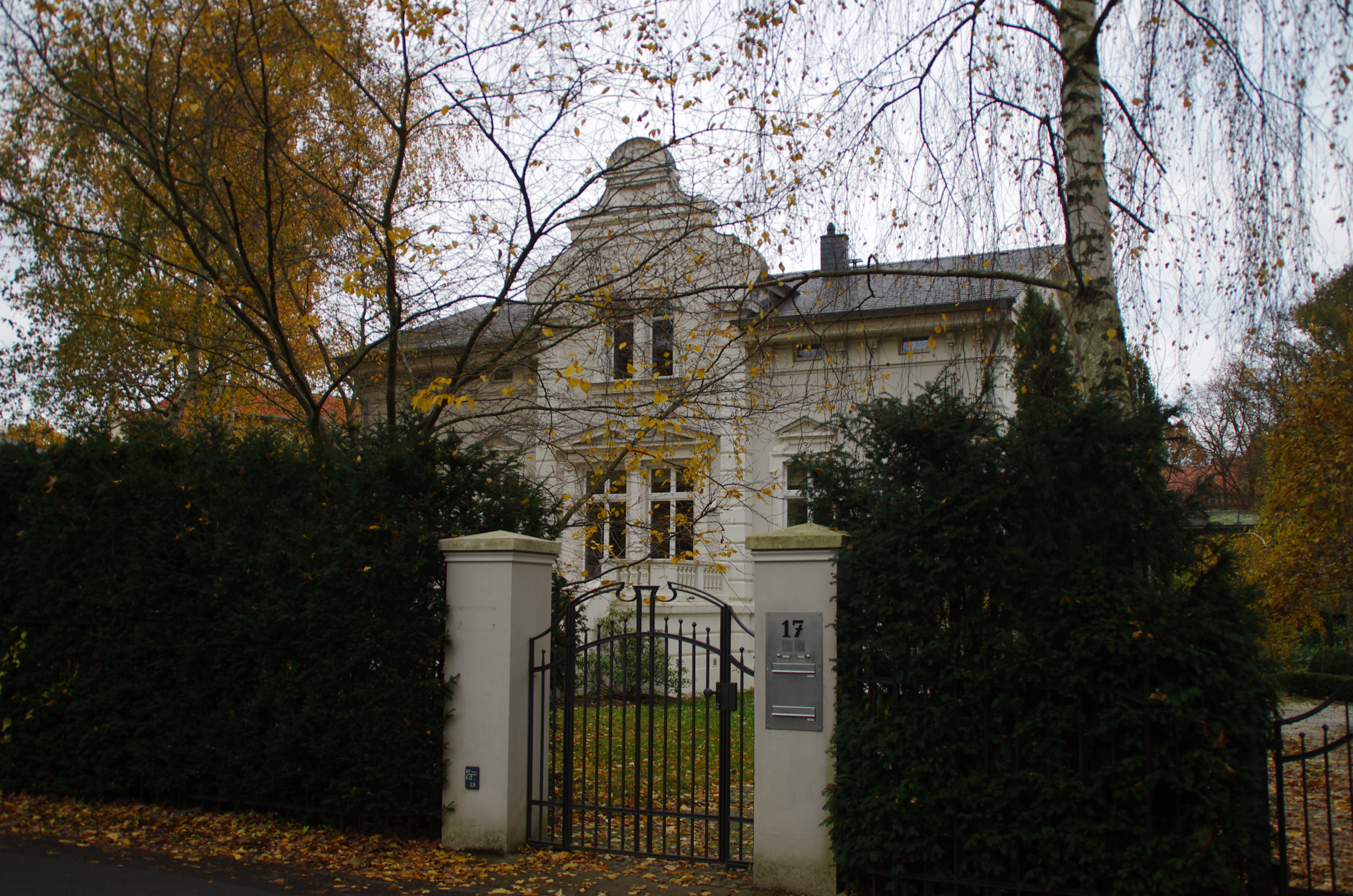 Potsdam in Brandenburg. Das Haus in der Große Weinmeisterstraße 17 steht unter Denkmalschutz.